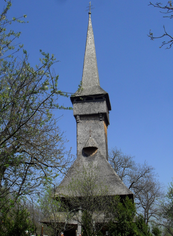 Rumunia, Desesti, drewniana cerkiew